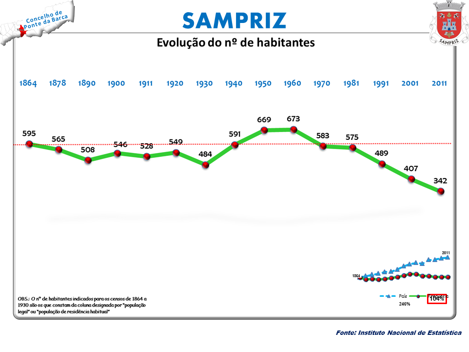 Censos 1864/2011